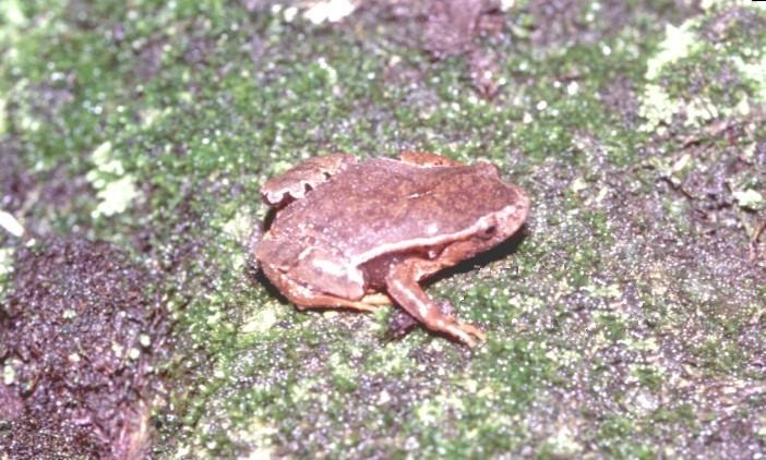 Paratelmatobius poecilogaster